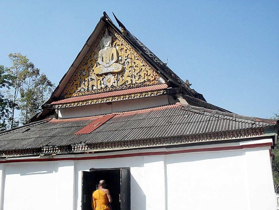 ubosotwatnongaree1